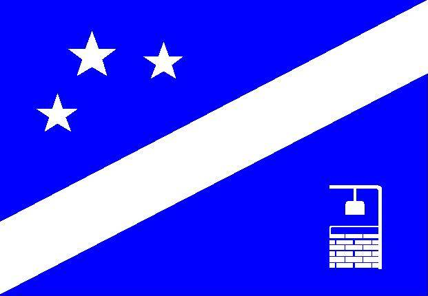 bandeira de agrestina, criada por Nicodemos José Torres (Tata da compesa) em 1980